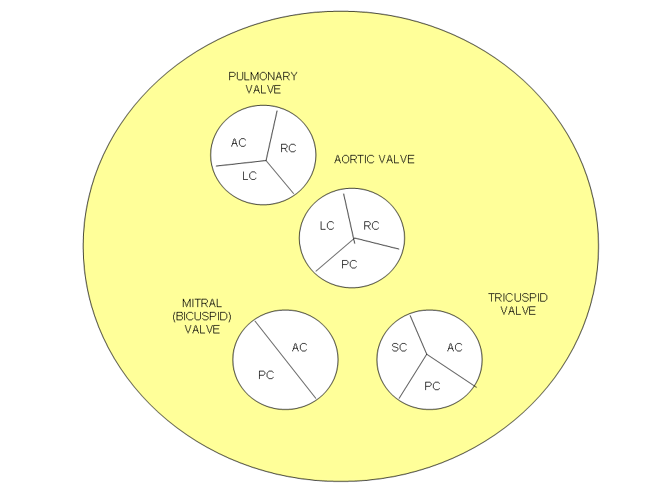 heart valves